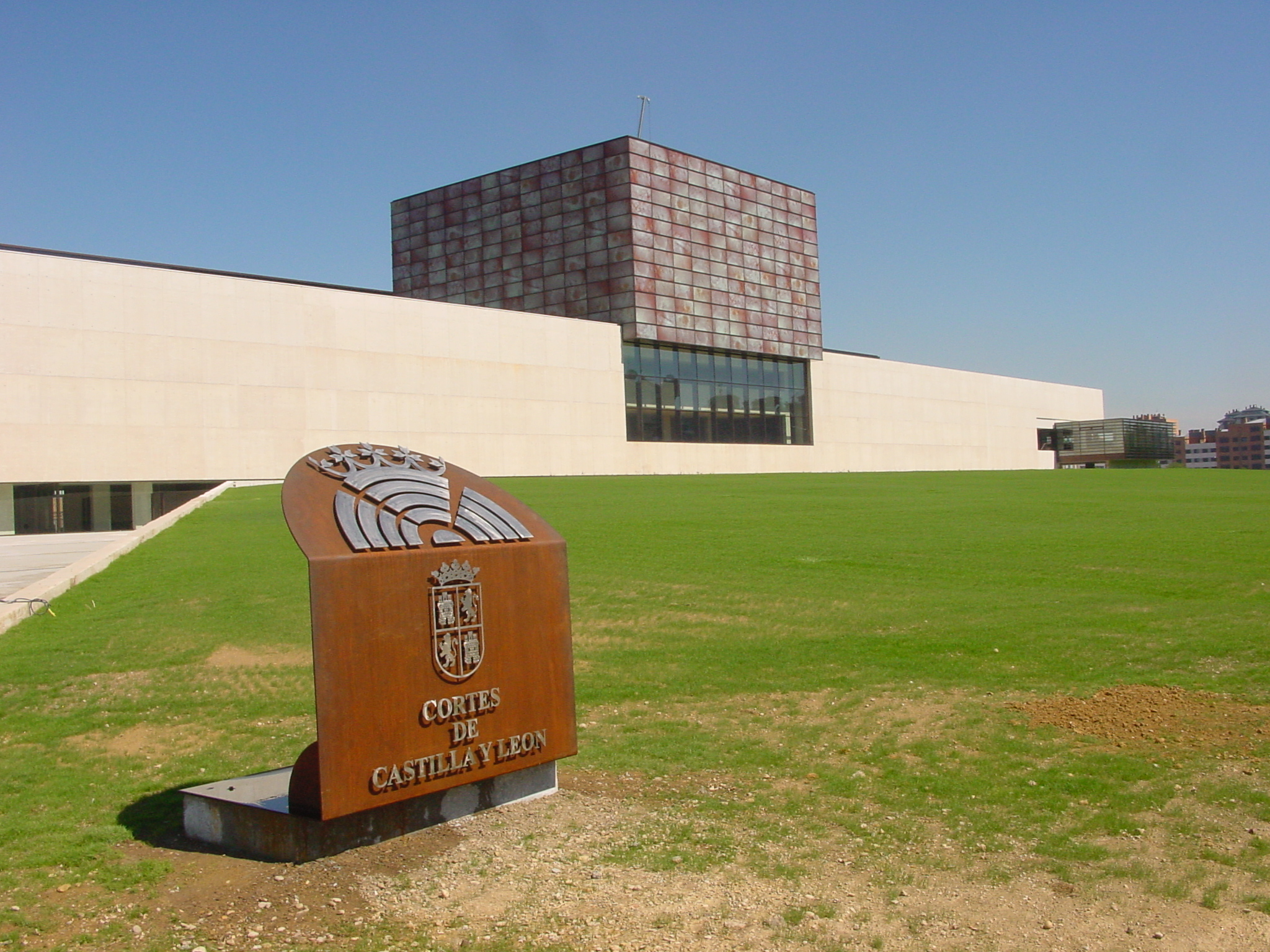 Valladolid. Edificio nuevo de las Cortes de Castilla y León inaugurado en junio de 2007.